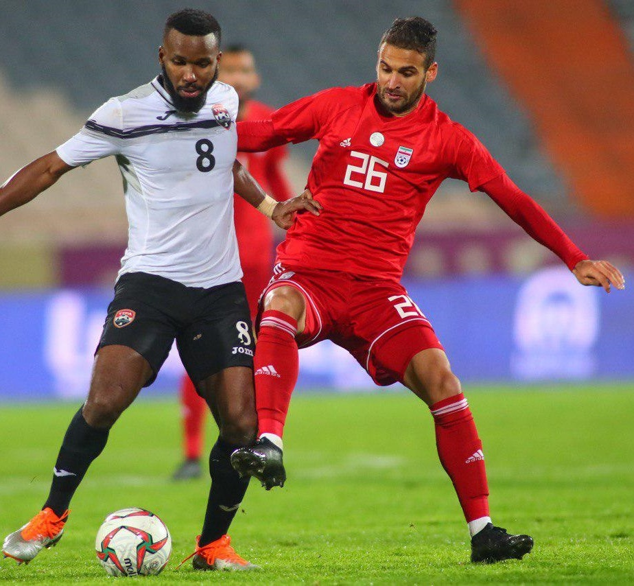 احمد نوراللهی در بازی دوستانه ایران و ترینیداد و توباگو در ورزشگاه آزادی